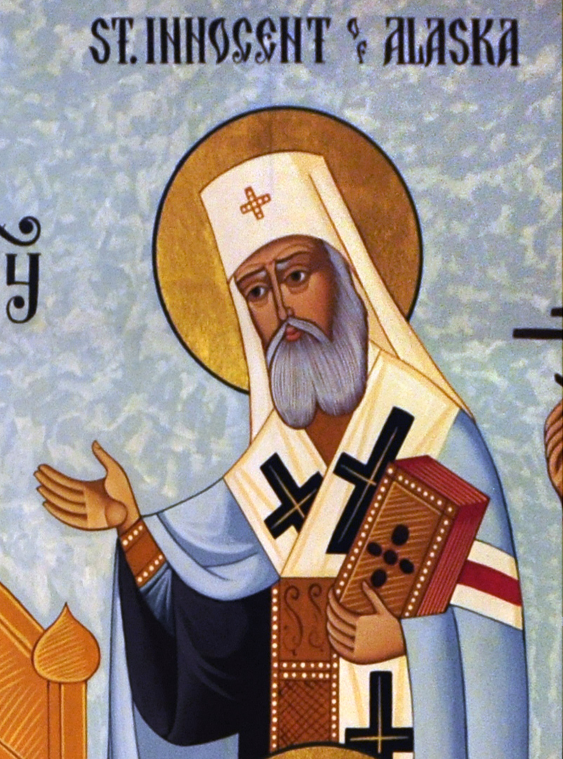 St Innocent of Alaska